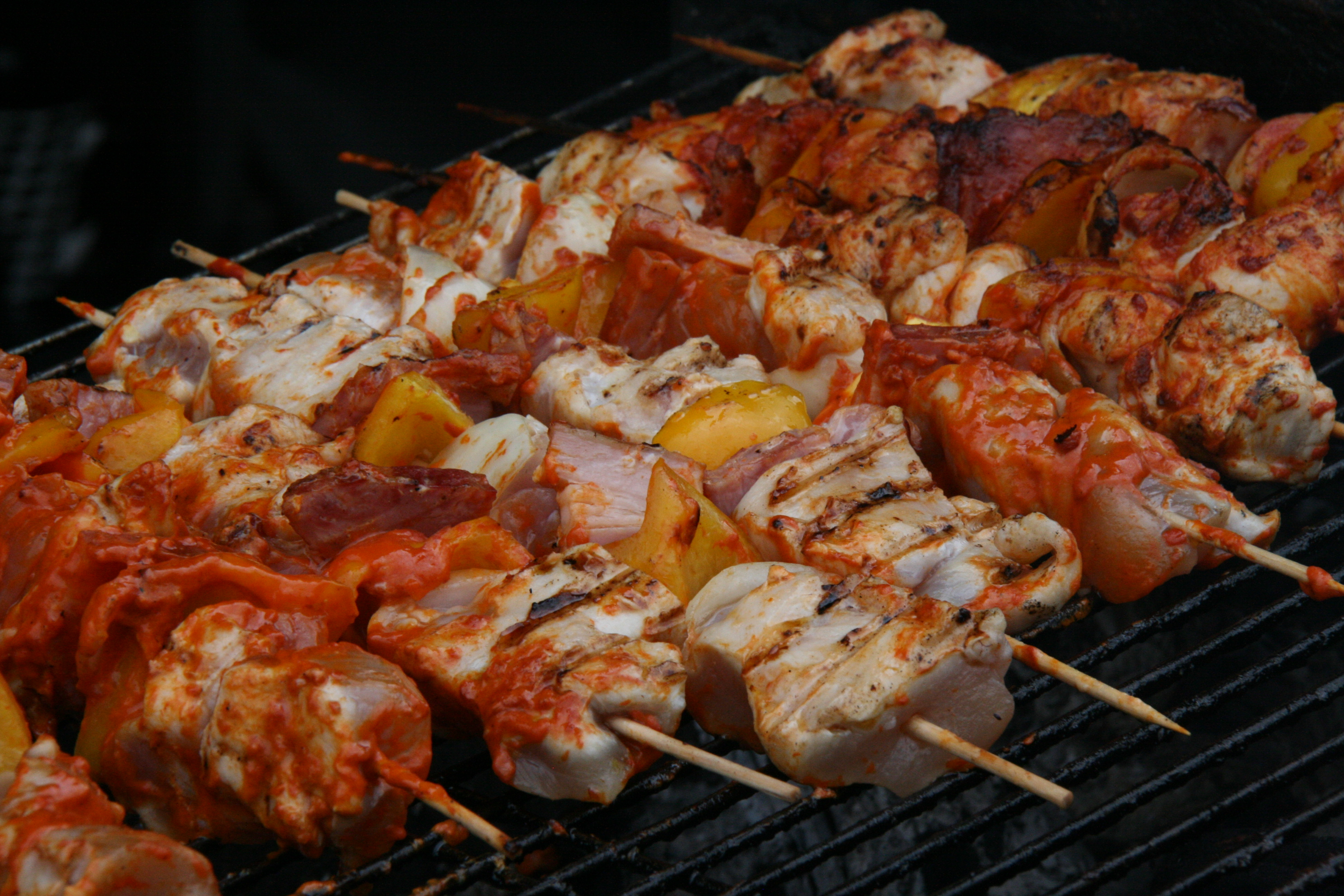 Brochetas de pollo marinadas